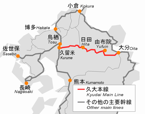 Map of Kyudai Main Line , Kyushu Japan.